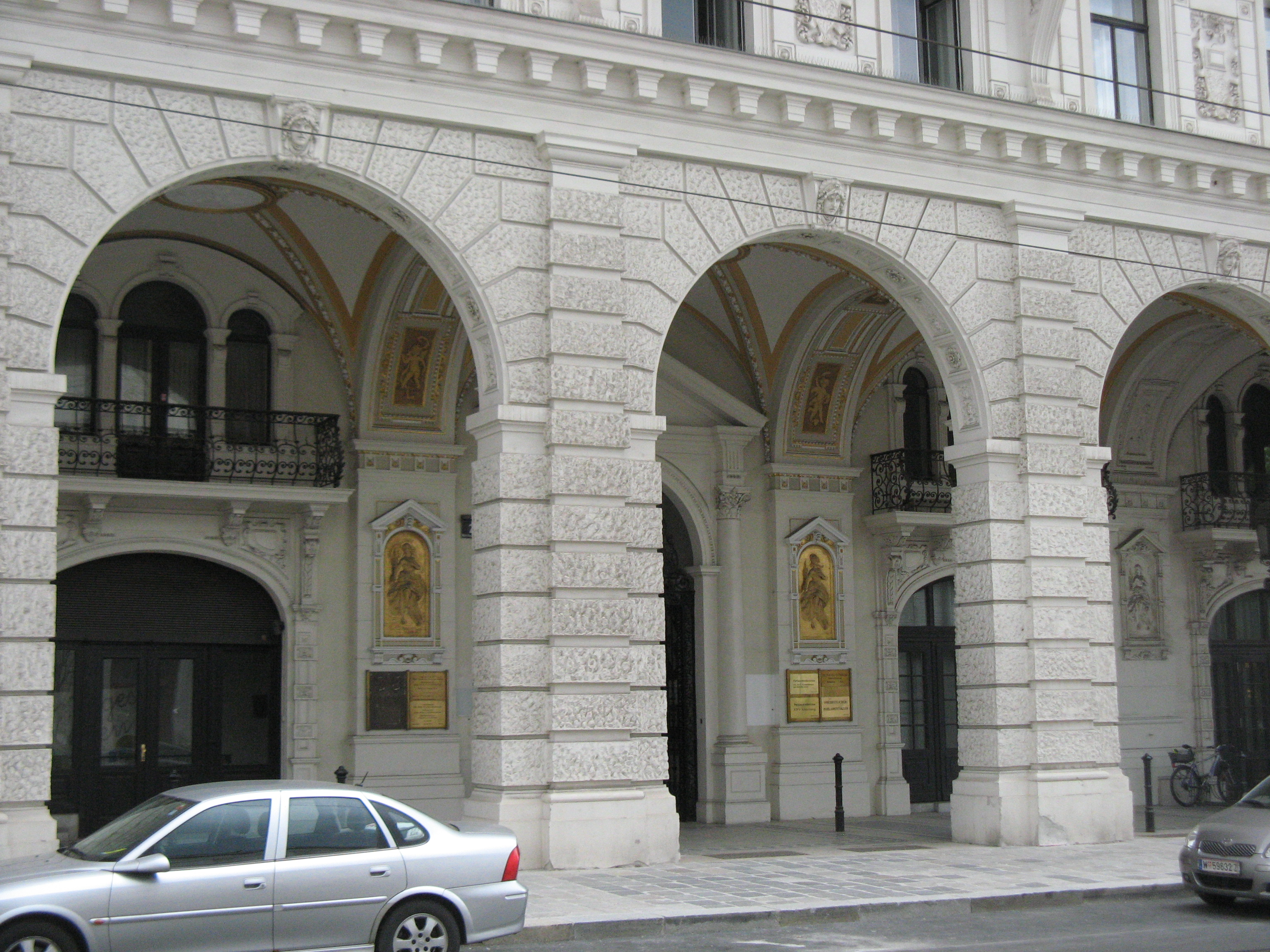 Arkaden, Reichsratsstraße 7, Wien-Innere Stadt